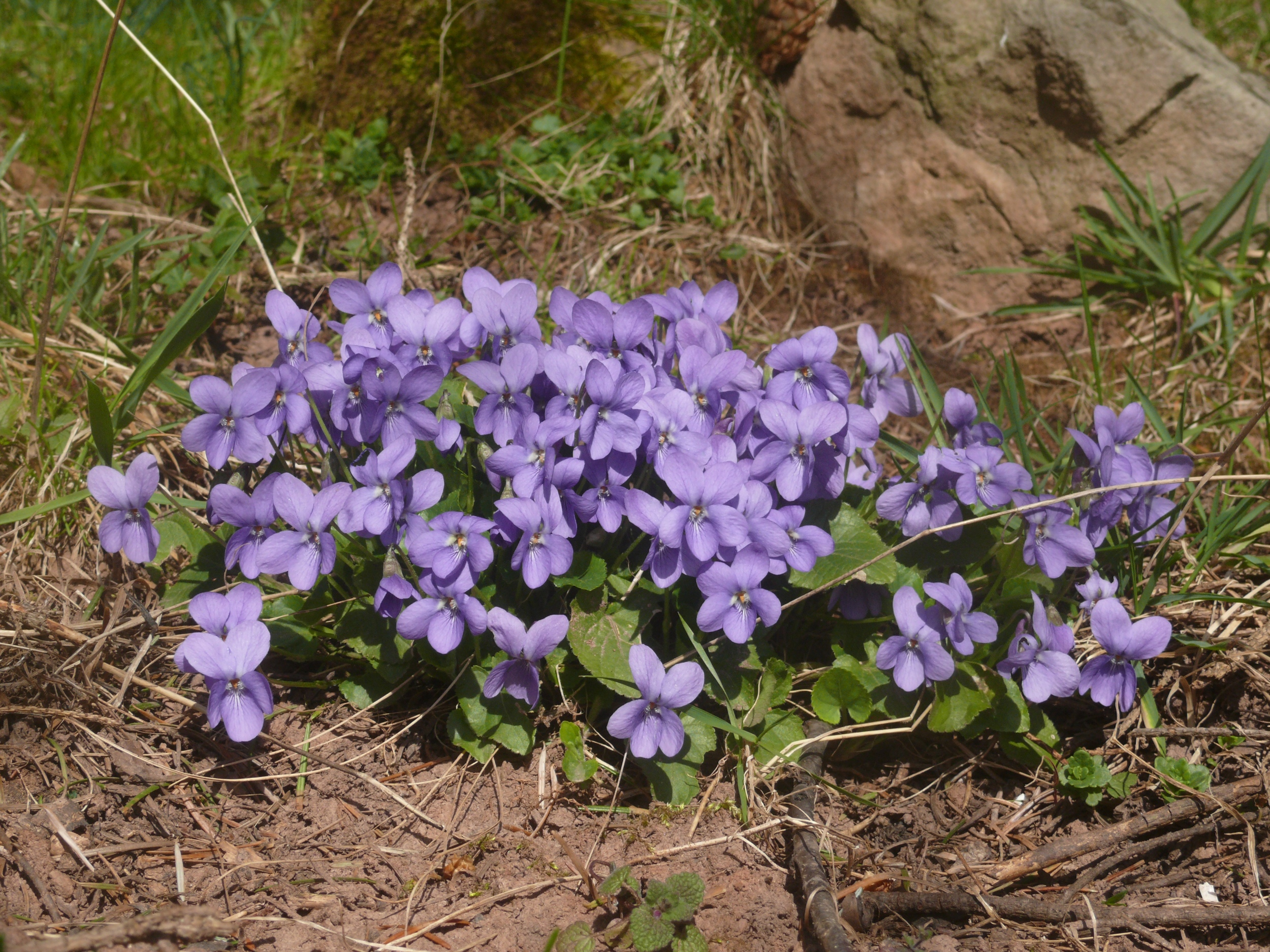 Viola odorata, Sandstein-Odenwald, Deutschland